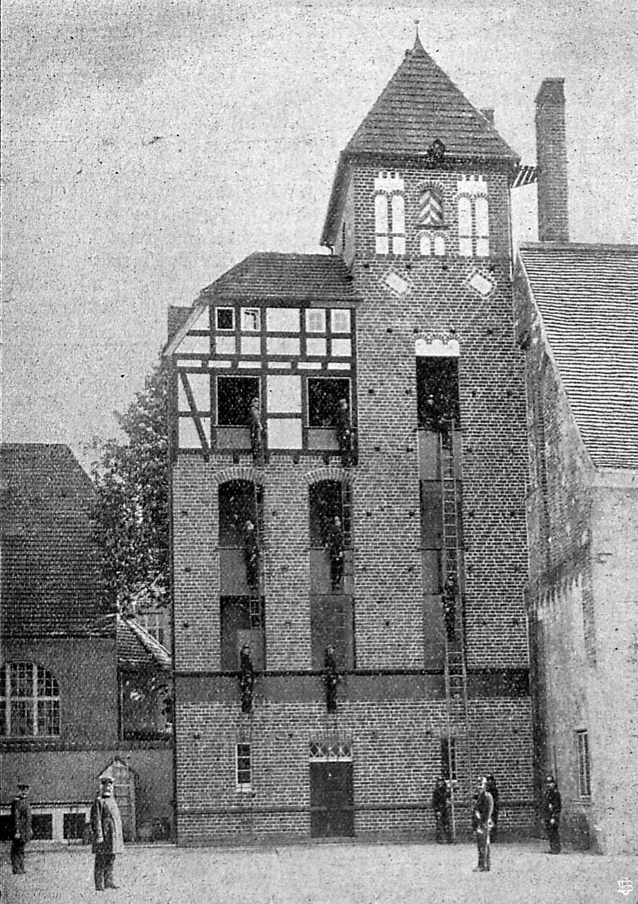 Übung mit Hakenleitern